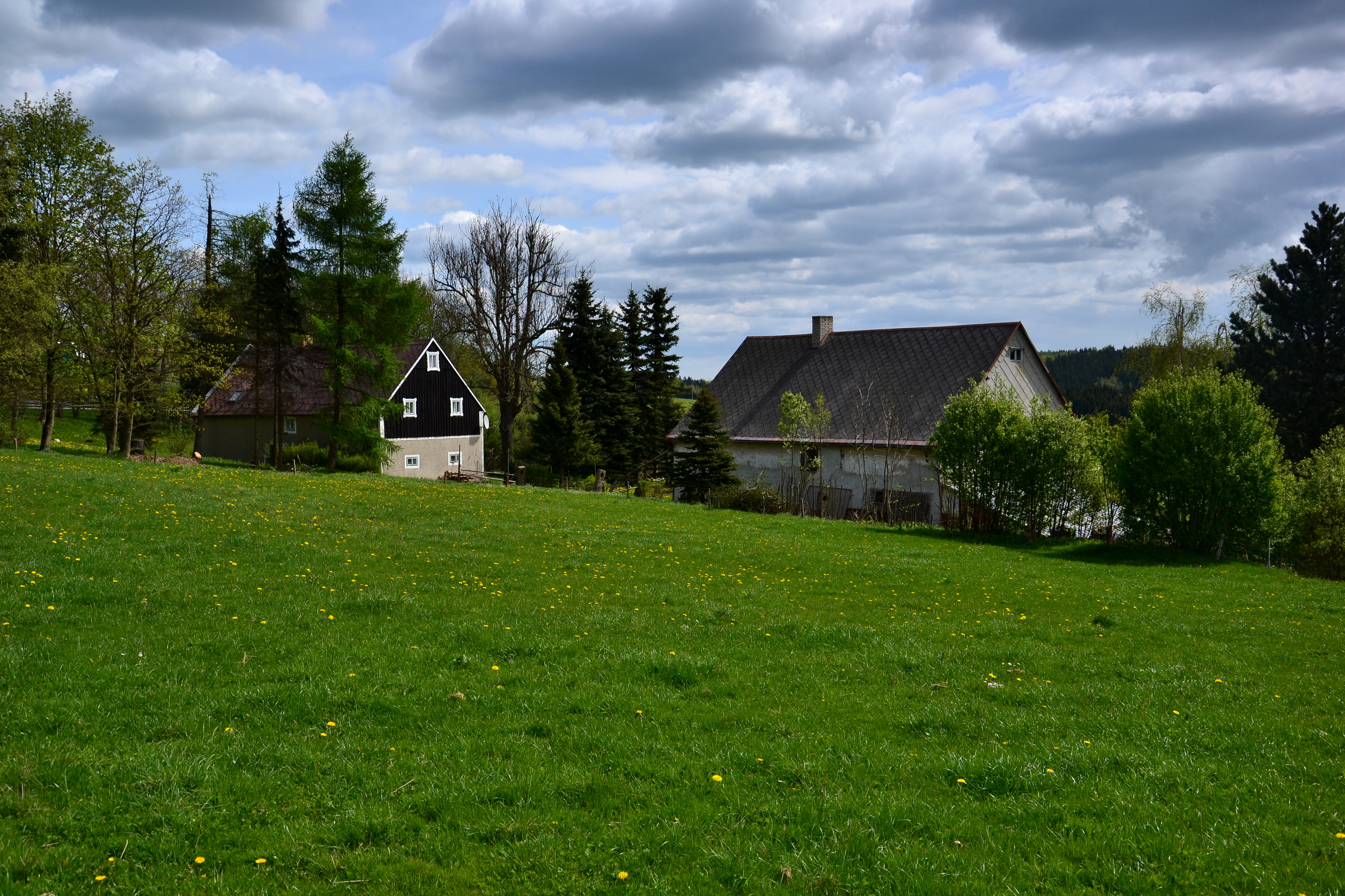 Domy jižně od silnice